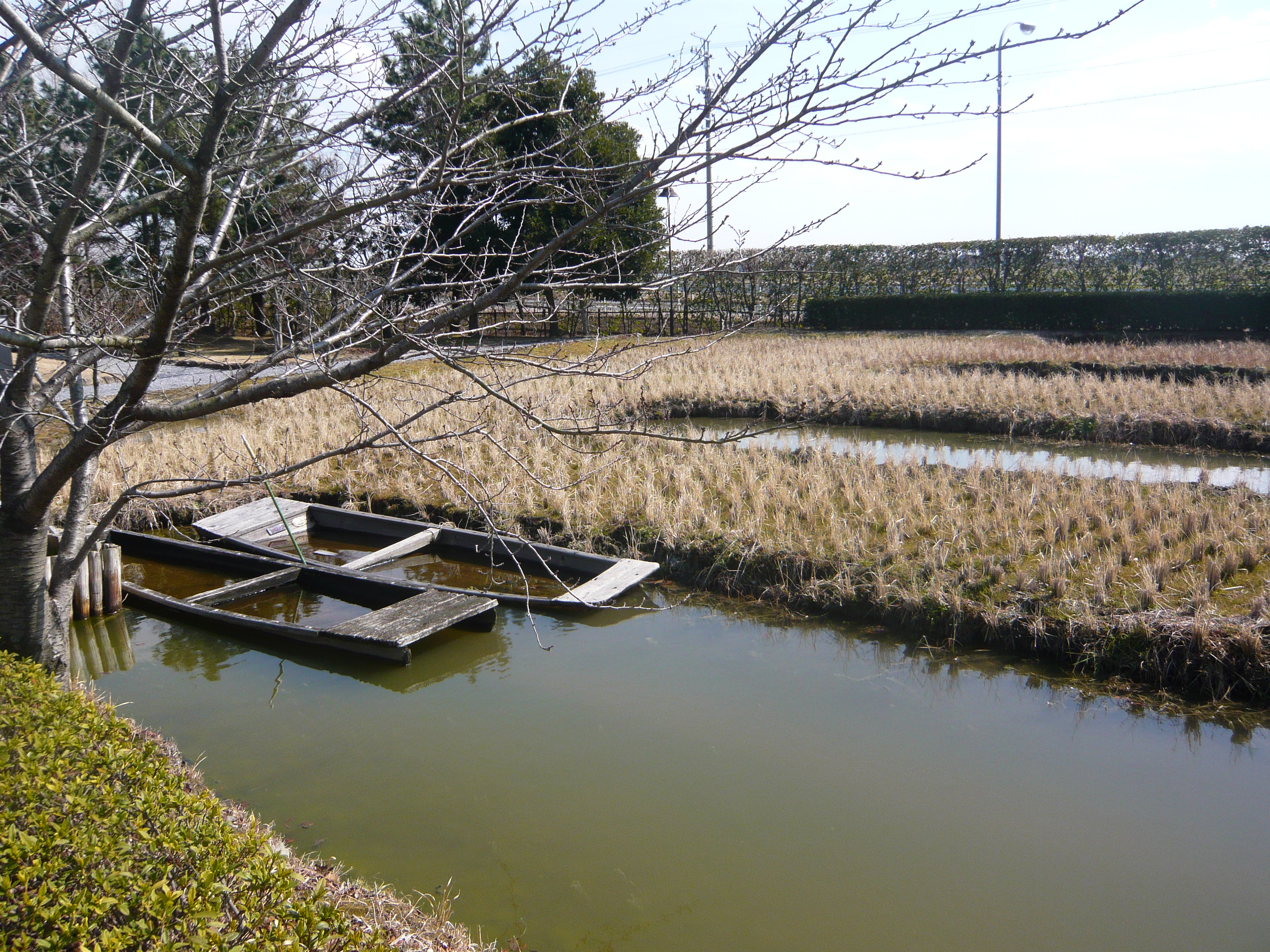 Kaizu City Museum 堀田（海津市歴史民俗資料館）,Kaizu,Gifu,Japan（岐阜県海津市）で撮影。